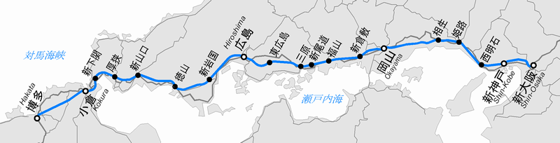 山陽新幹線地図 簡素版